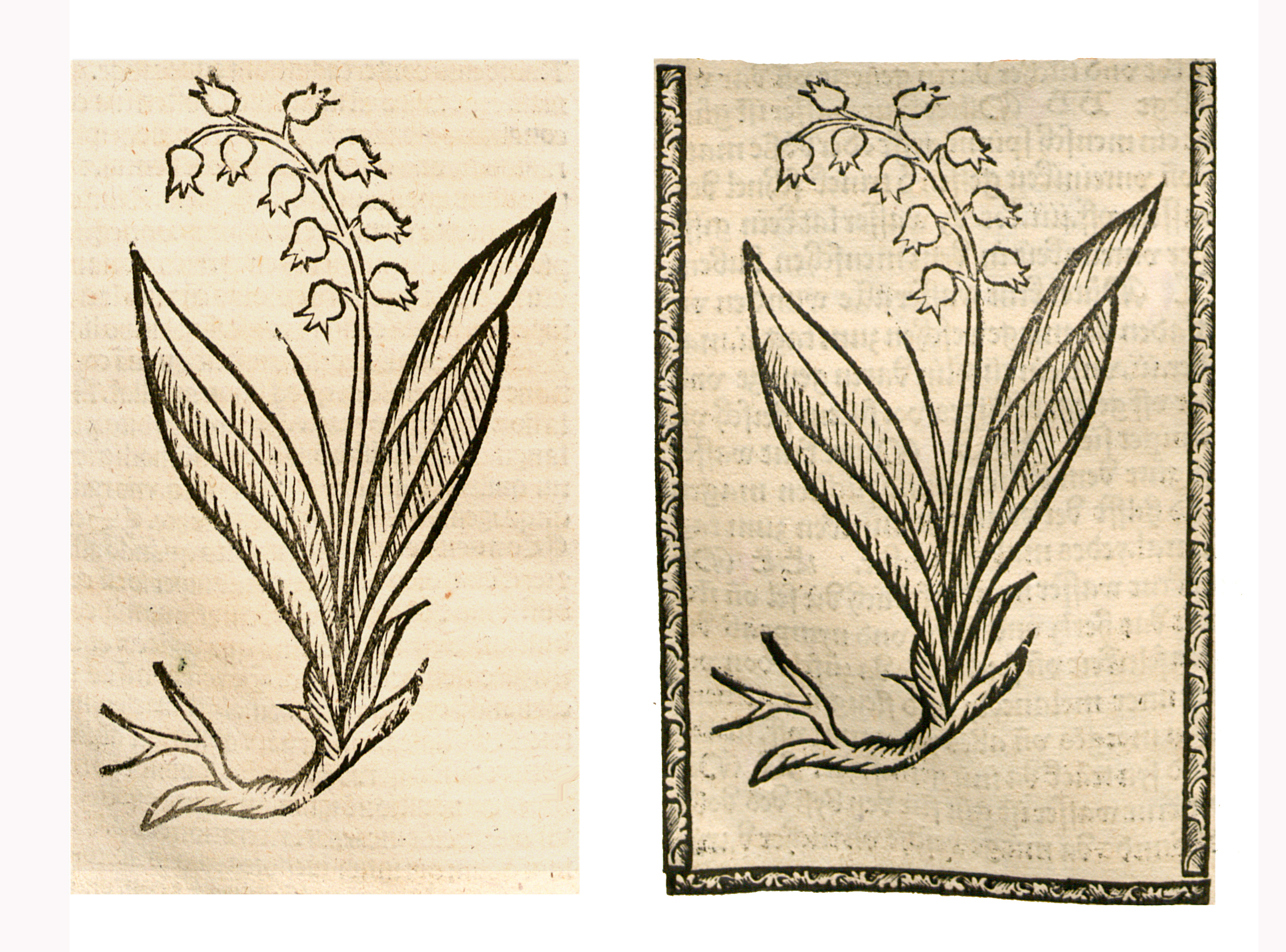 Abbildung von: Mey Blüemel (Convallaria majalis)